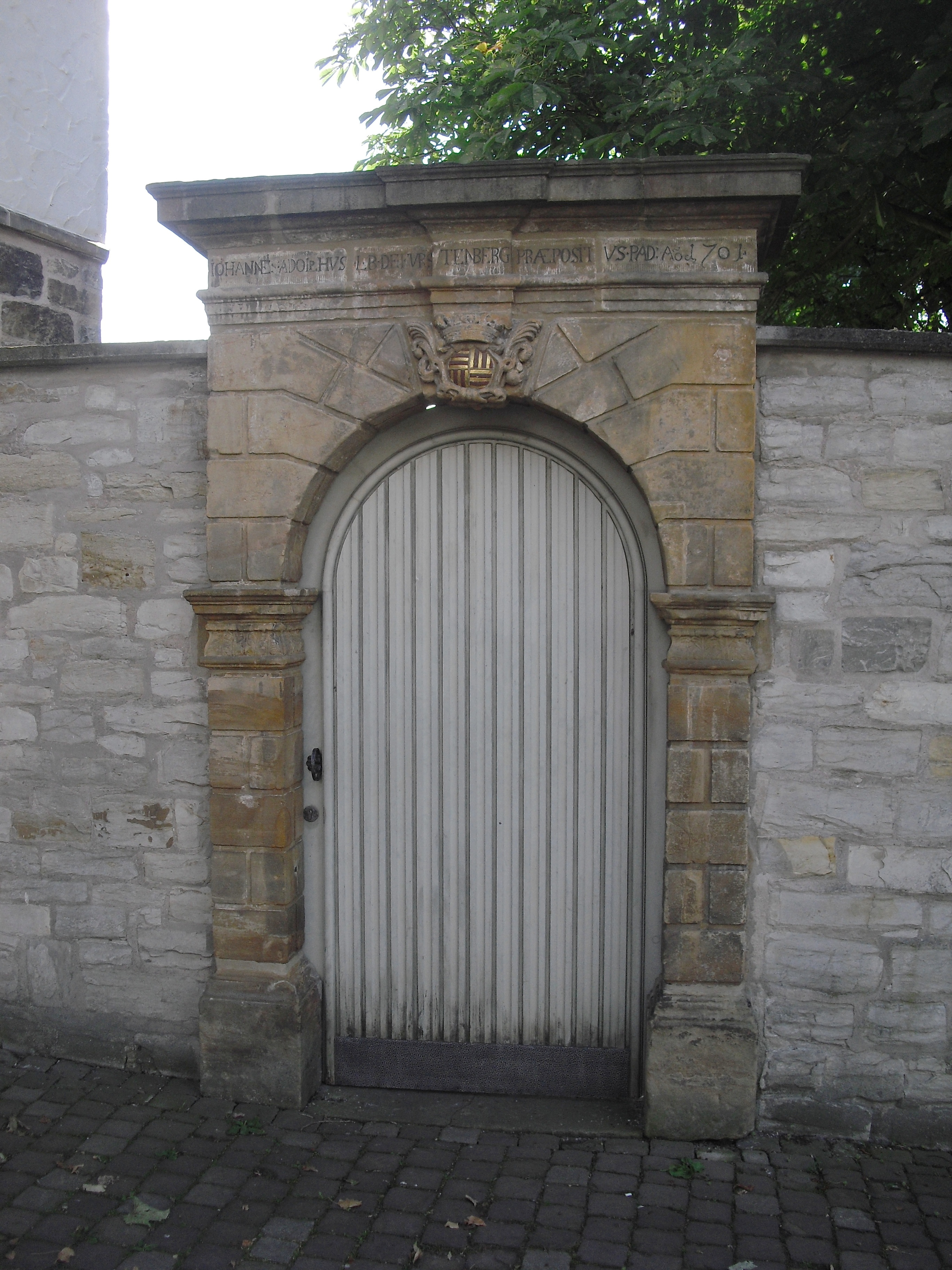 Portal zur 1701 erbauten und 1945 zerstörten Dompropsteikurie am kleinen Domplatz in Paderborn